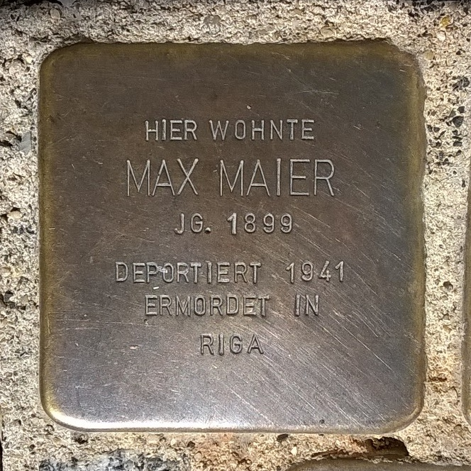 Stolperstein für Max Maier in D-74081 Heilbronn(-Horkheim), Hohenloher Straße 15